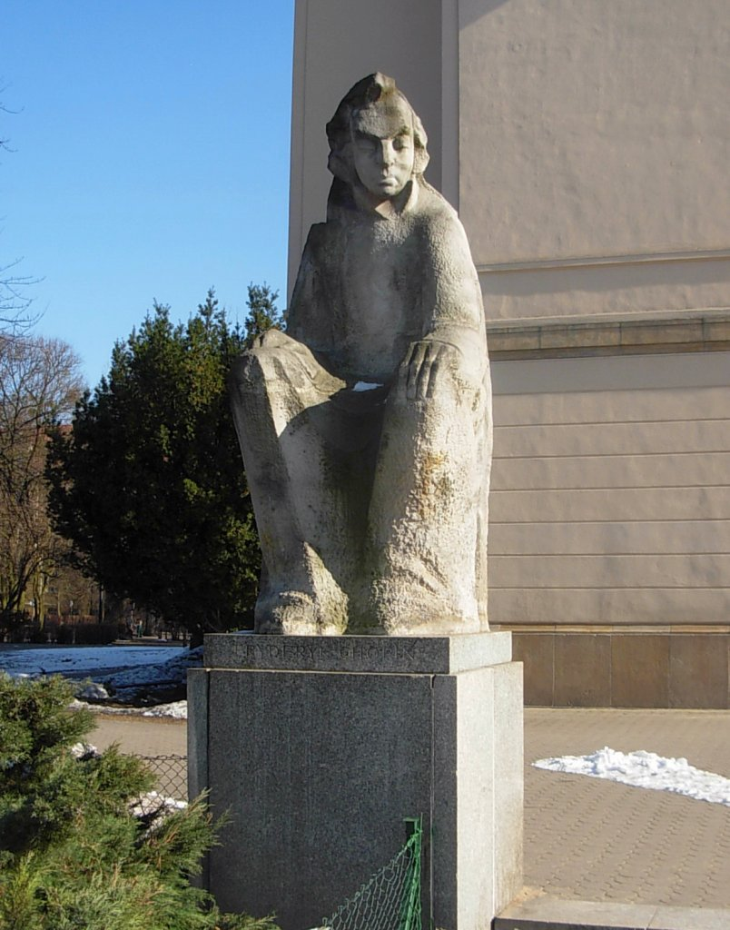 Galeria pomników kompozytorów i wirtuozów muzyki poważnej w Bydgoszczy - pomnik Fryderyka Chopina